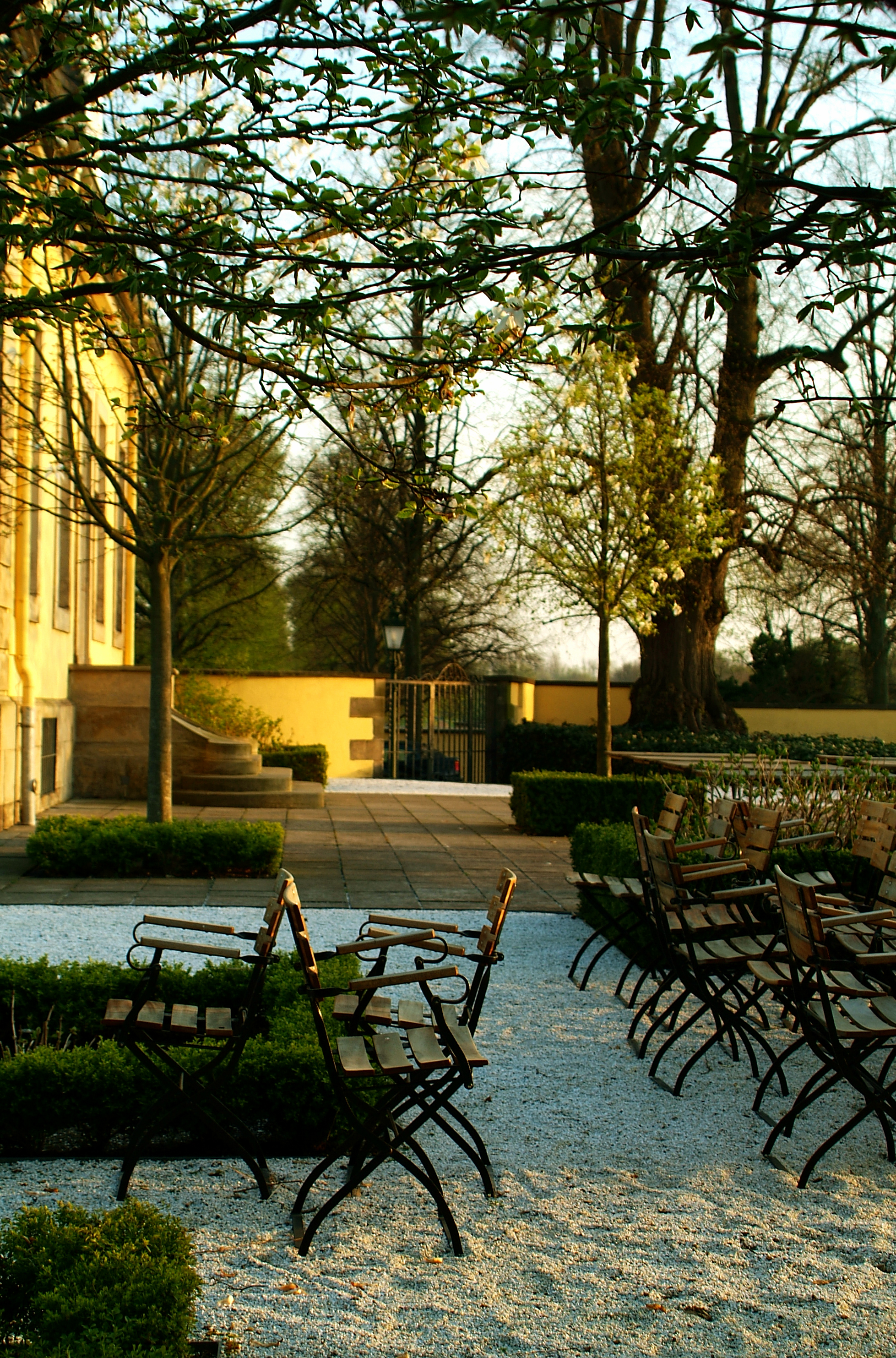 Sie haben ein besses Bild? Sogar ein historisches? Zeigen Sie' s uns. Allen Menschen.